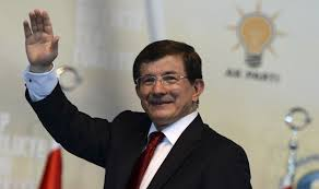 ahmet davutoğlu 5.olağan kongrede